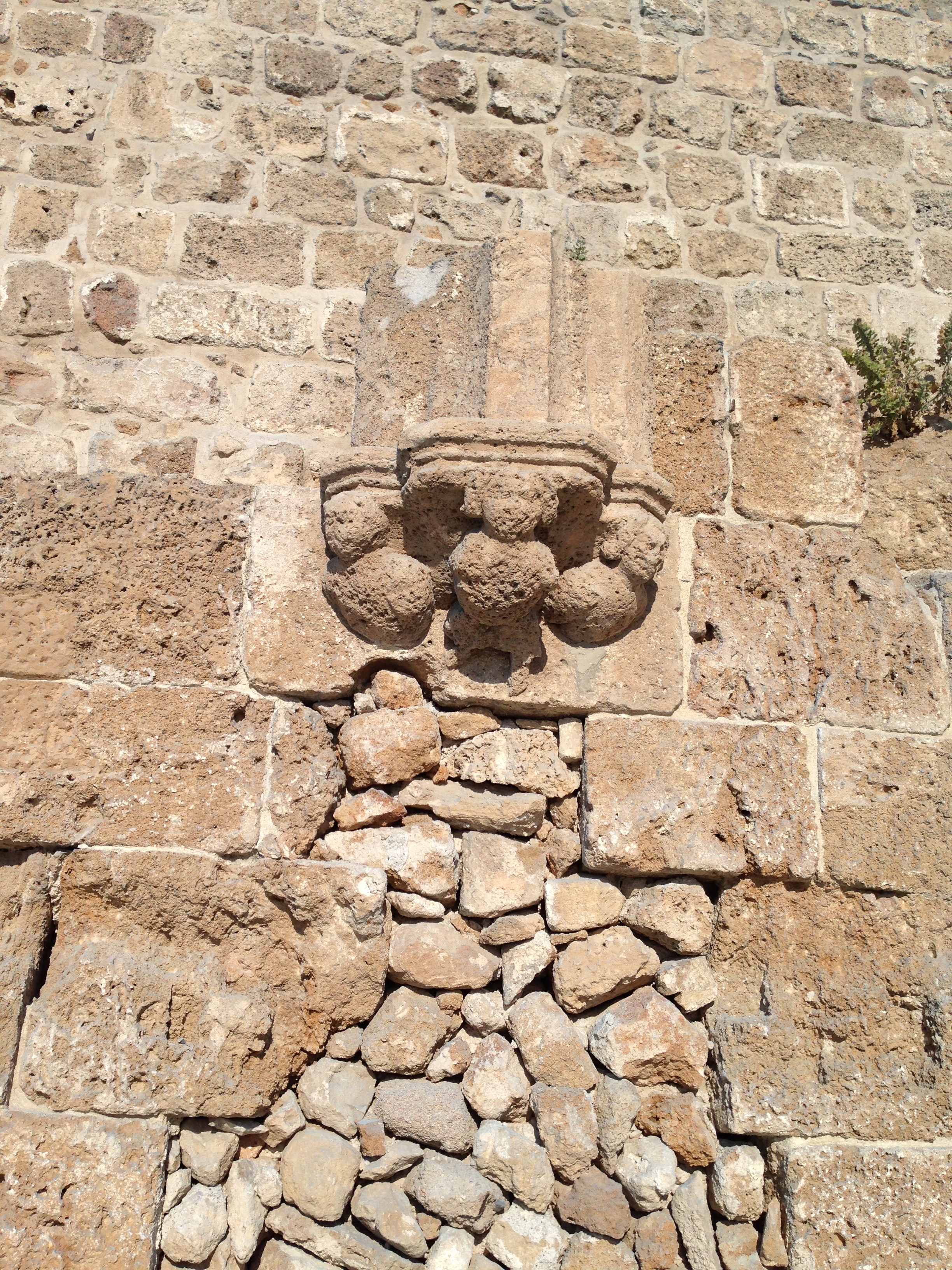 שרידי הפגזת עכו בשנת 1840 על ידי הצי הבריטי החור בקיר נוצר כתוצאה מההפגזה והוא תוקן לאחר מכן בעזרת אבנים קטנות בקיר החומה של מסגד אל שאזליה שבצידו השני נמצאים אולמות האבירים